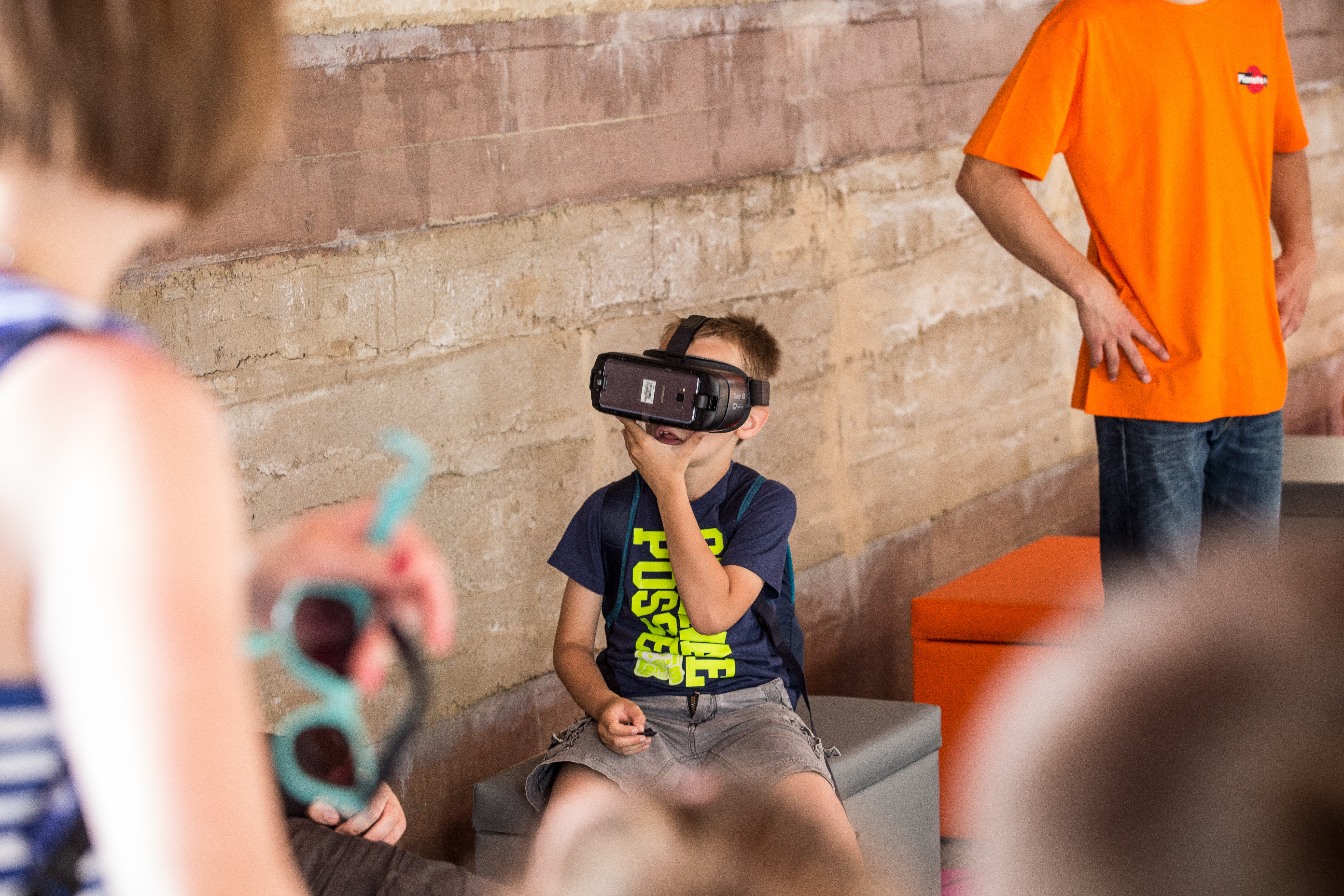 01.07.2017 WARSZAWA CENTRUM NAUKI KOPERNIK PLENEROWE WARSZTATY WEEKENDOWE W STREFIE POMIEDZY CNK A PLANETARIUM . FOT. ADAM KOZAK